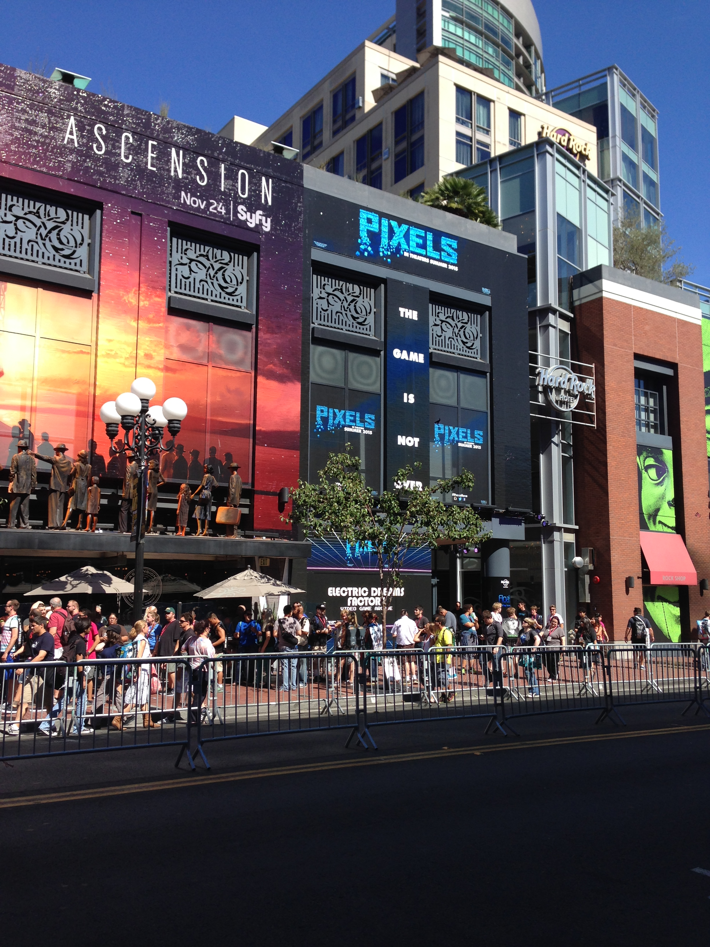 San Diego Comic Con 2014